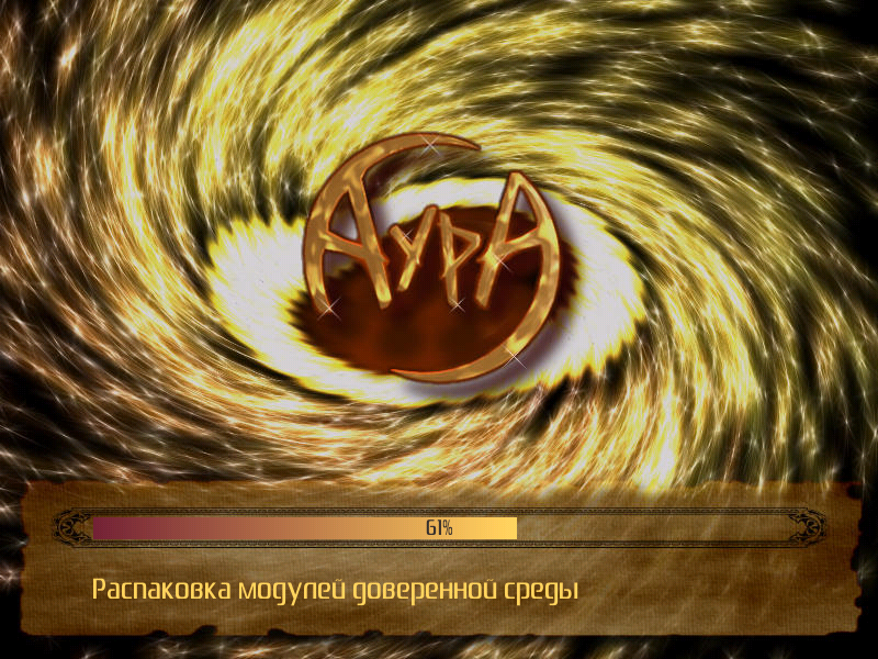 Скриншот загрузки СЗИ "Аура" в доверенной среде